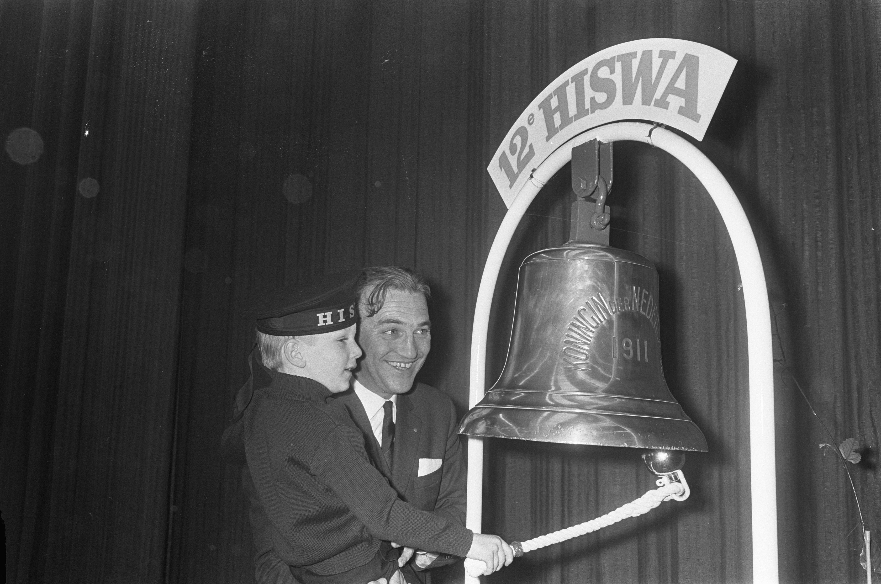 Collectie / Archief : Fotocollectie Anefo Reportage / Serie : [ onbekend ] Beschrijving : Opening van de HISWA 1967 door staatssecretaris drs. L.J.M. van Son Datum : 10 maart 1967 Locatie : Amsterdam, Noord-Holland Trefwoorden : beurzen, openingen, staatssecretarissen Persoonsnaam : Son, L.J.M. van Instellingsnaam : HISWA Fotograaf : Koch, Eric / Anefo Auteursrechthebbende : Nationaal Archief Materiaalsoort : Negatief (zwart/wit) Nummer archiefinventaris : bekijk toegang 2.24.01.05 Bestanddeelnummer : 920-1525